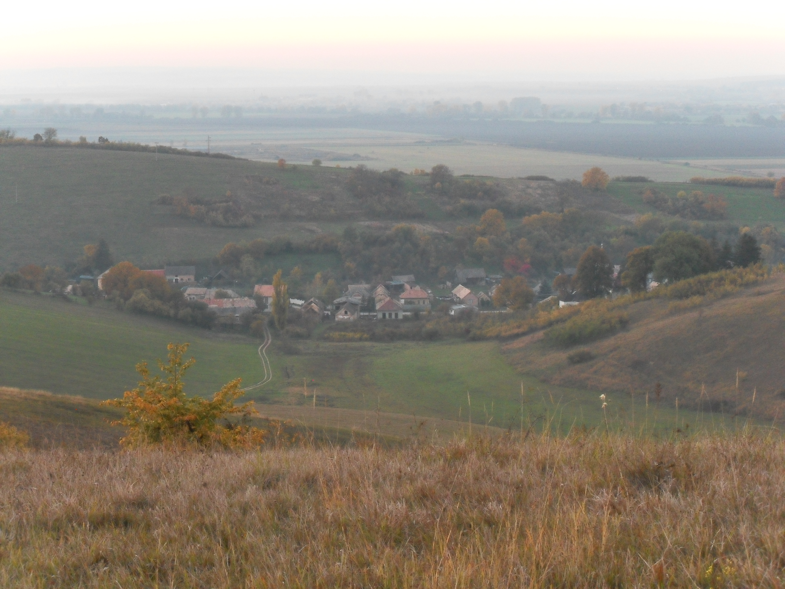 Jéne község látképe